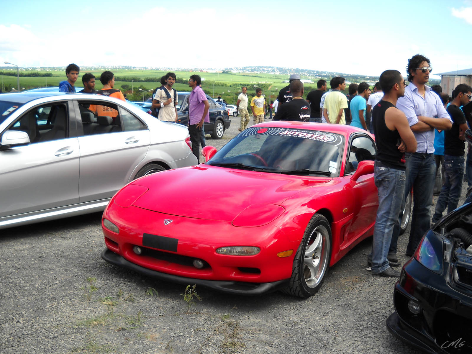 DSCN1497_2